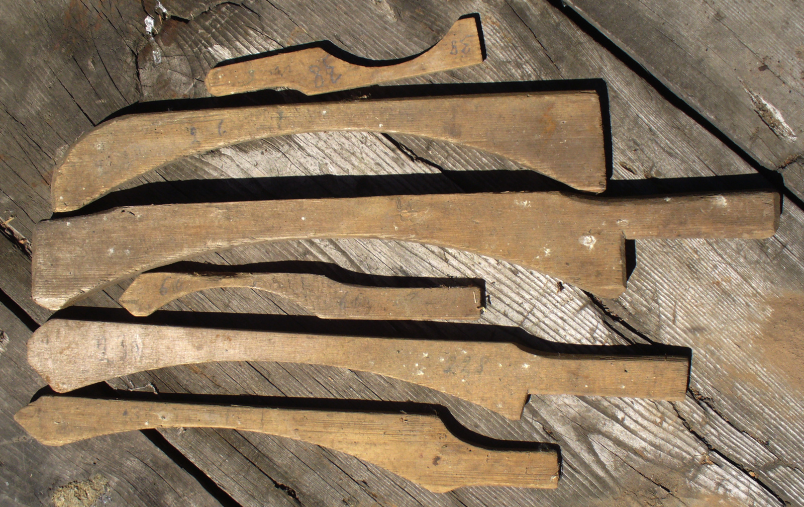 Шаблоны для вырабу бандарных клёпак. Вцтебская вобл.